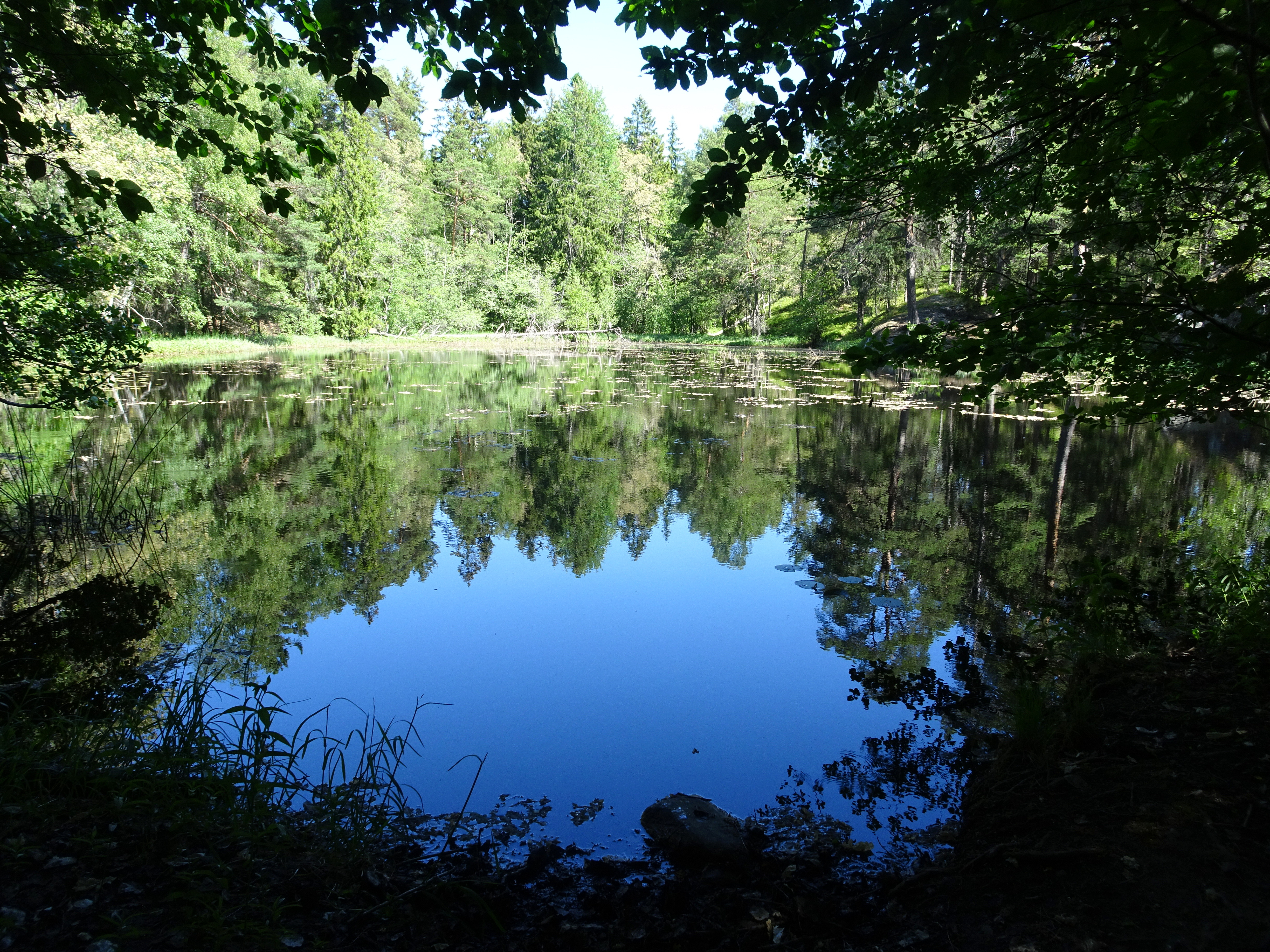 Trollsjöns naturreservat